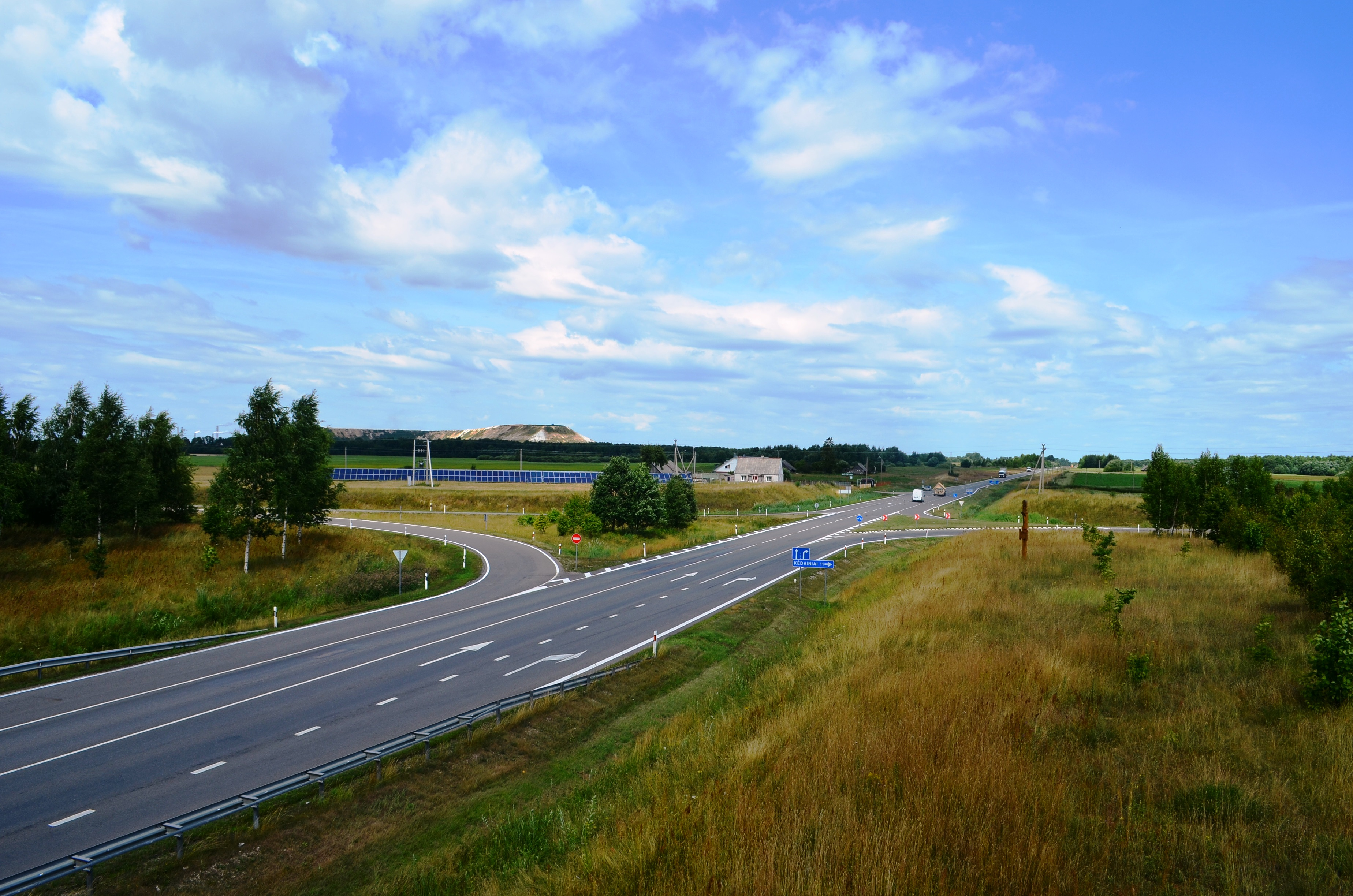 Via Baltica ties Nociūnais. Kėdainių raj.